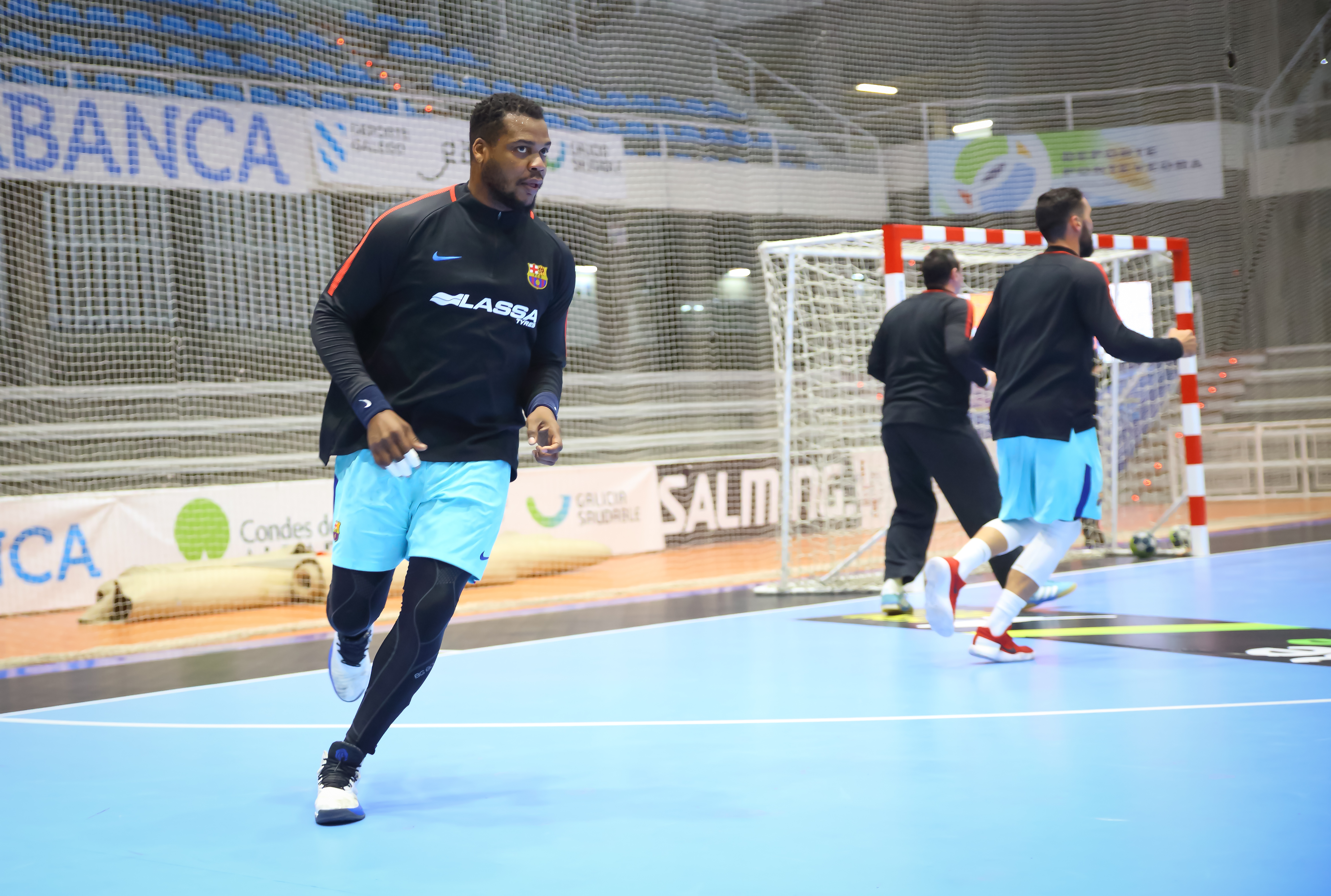 Condes de Albarei Teucro – FC Barcelona Lassa: (28-38) Los de Xavi Pascual derrotan al equipo gallego y cierran la primera vuelta de la Asobal con un nuevo triunfo en la competición doméstica, en un partido en el que Valero Rivera ha sido el máximo anotador